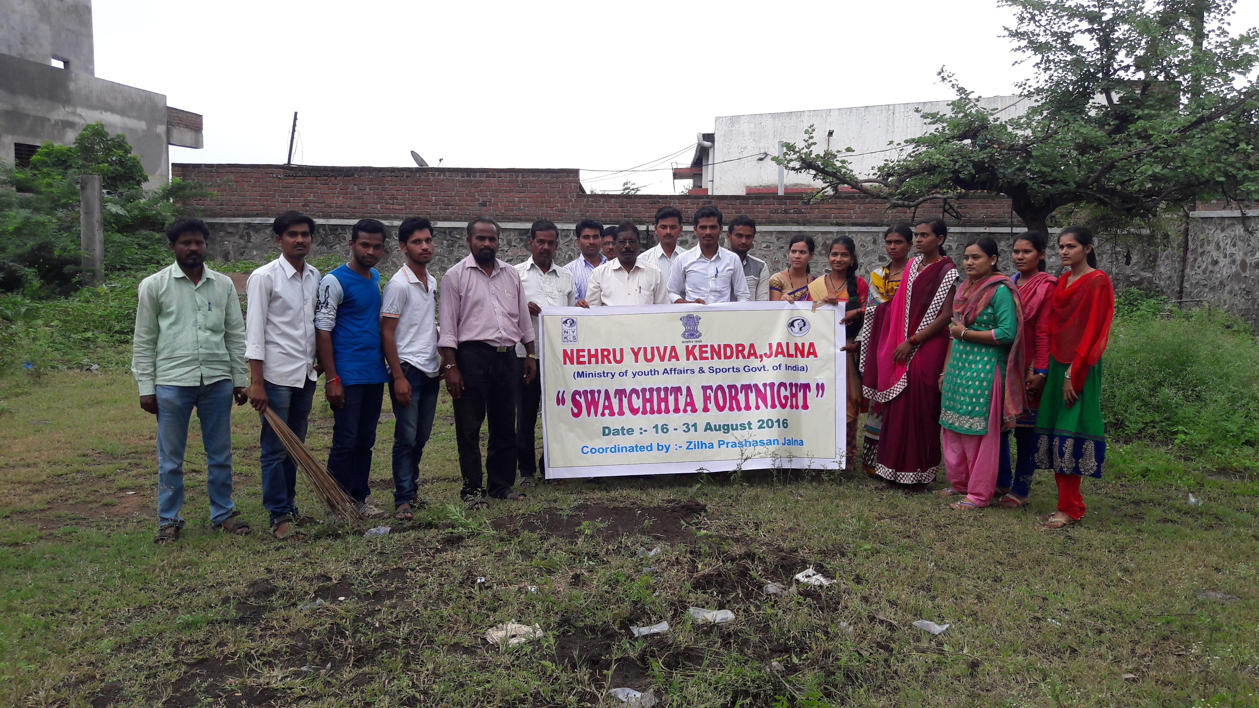 महाराष्ट्र में नेहरू युवा केन्द्र संघटन, जालना द्वारा आयोजित ‘स्वच्छता अभियान’ में शामिल राष्ट्रिय युवा स्वयंसेवक एवं स्वयंसेविकाएँ